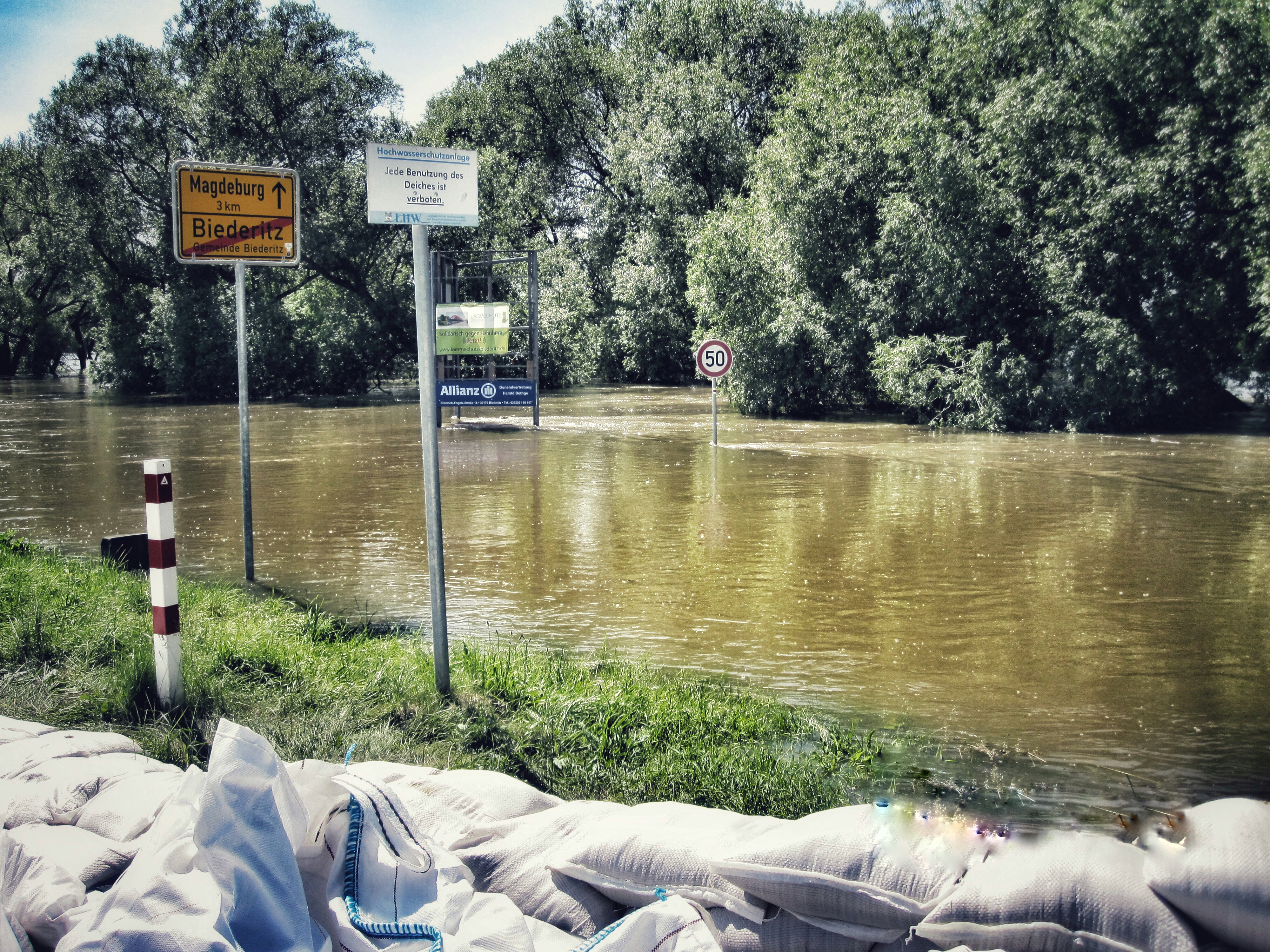 überflutete Magdeburger Straße Biederitz